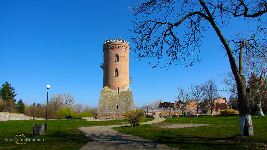 Targoviste-Chindia-Tower